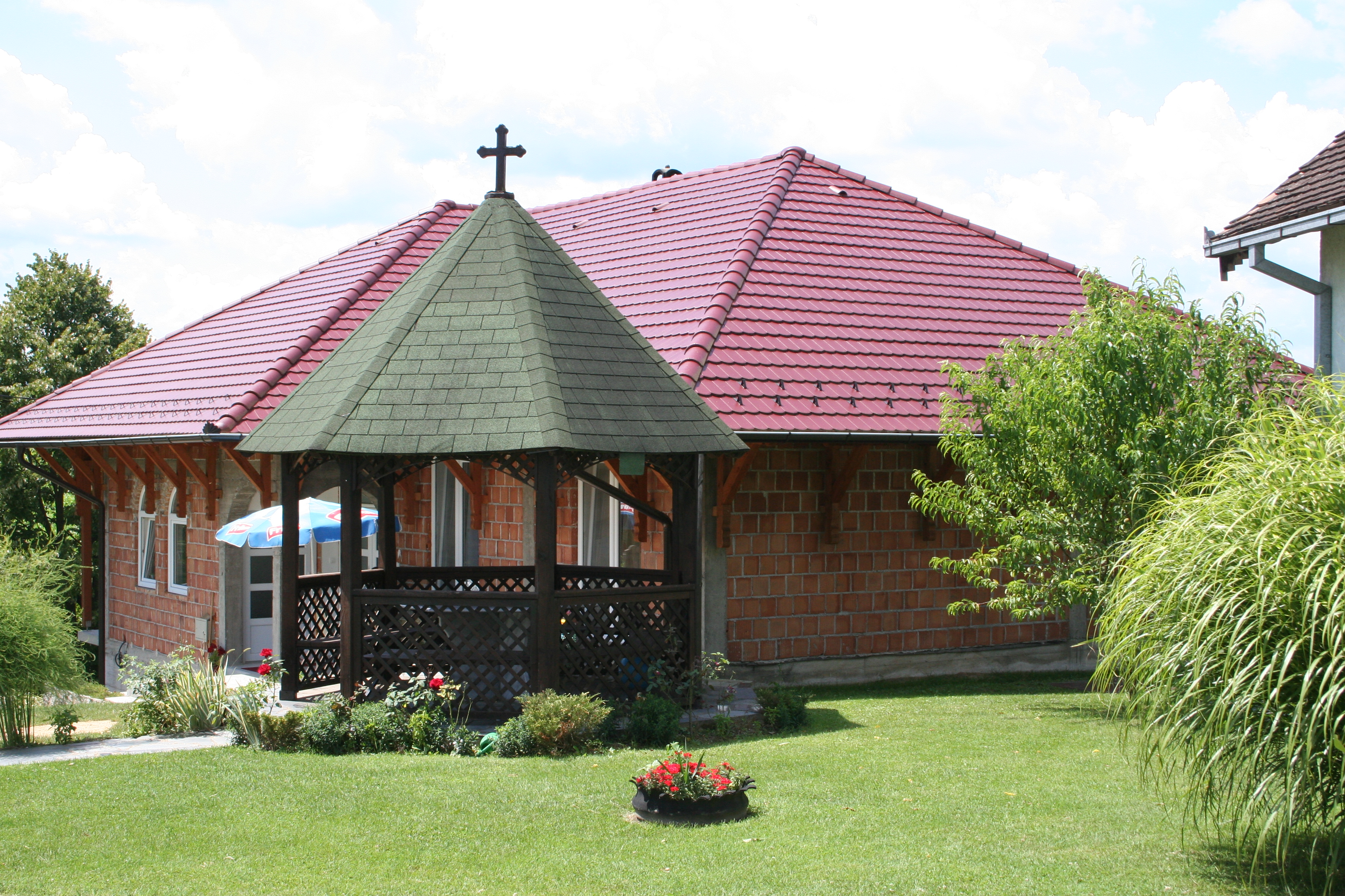 Crkva Sv. Georgija, Mojković